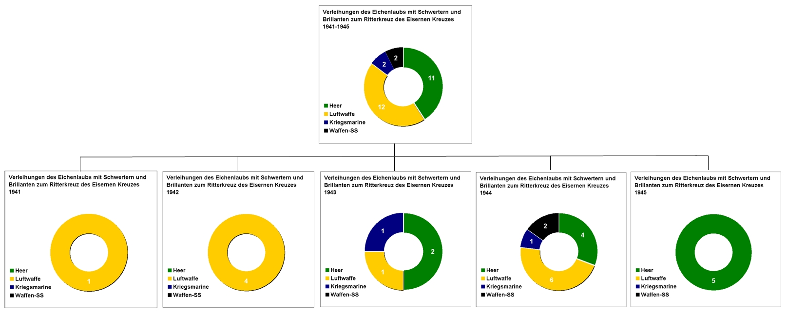 Verleihungszahlen Ritterkreuz des Eisernen Kreuzes mit Eichenlaub Schwertern und Brillanten